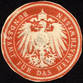 Sealing stamp Title: Bundesamt für das Heimatwesen Description: Briefsiegel, rotbraun, weiß, geprägt Place: size: 3 cm